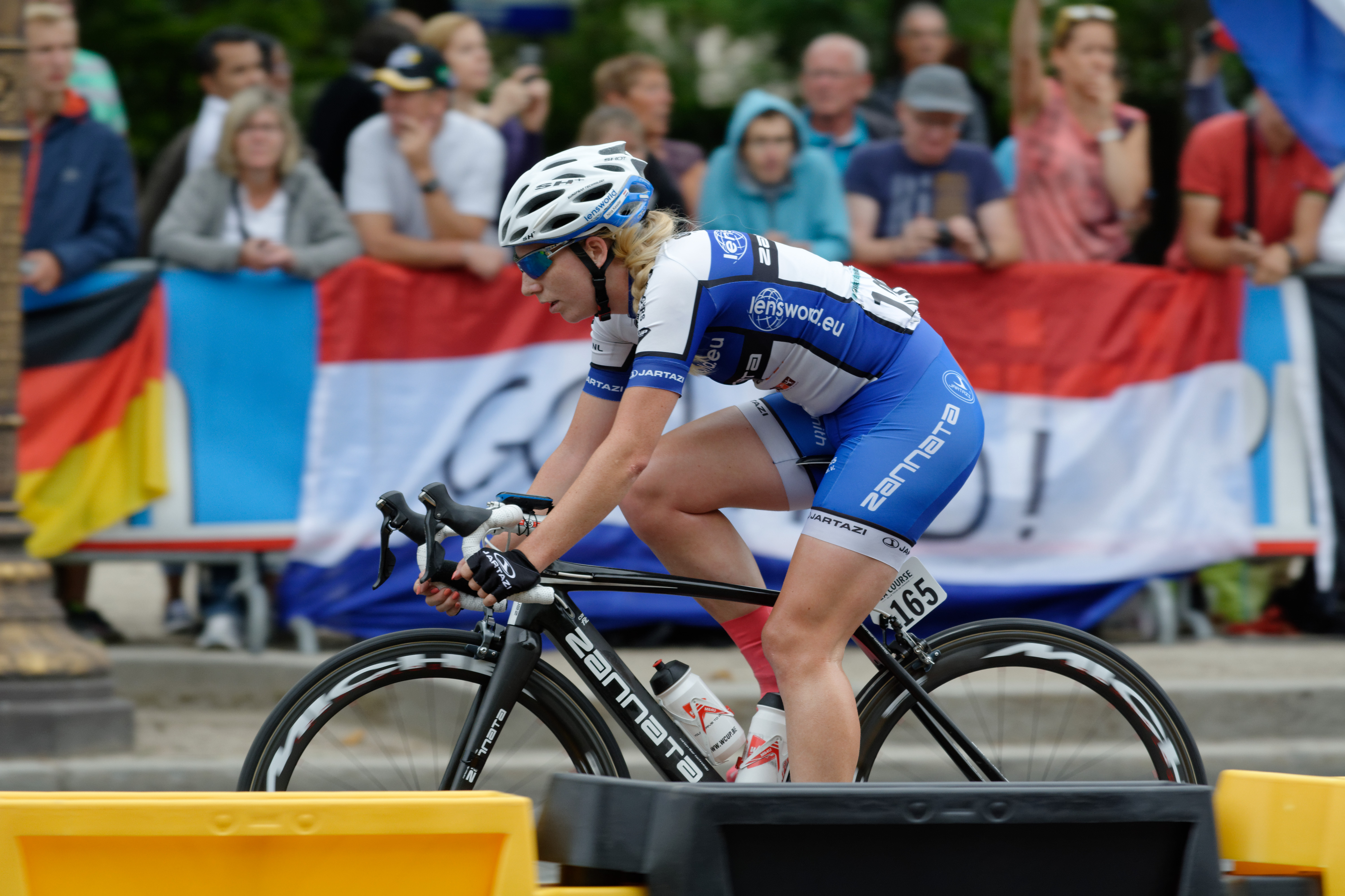 D71_1588_DxO